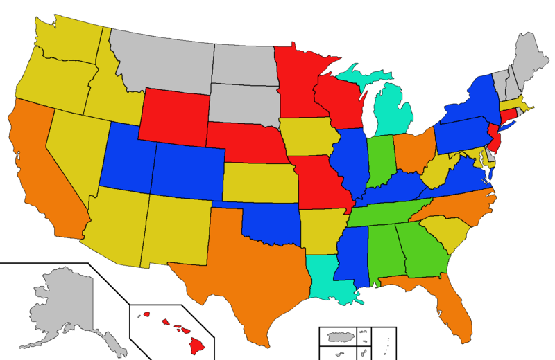 Nopmbre déquipes universitaires faisant partie de la Division 1 FBS de football américain aux états-unis